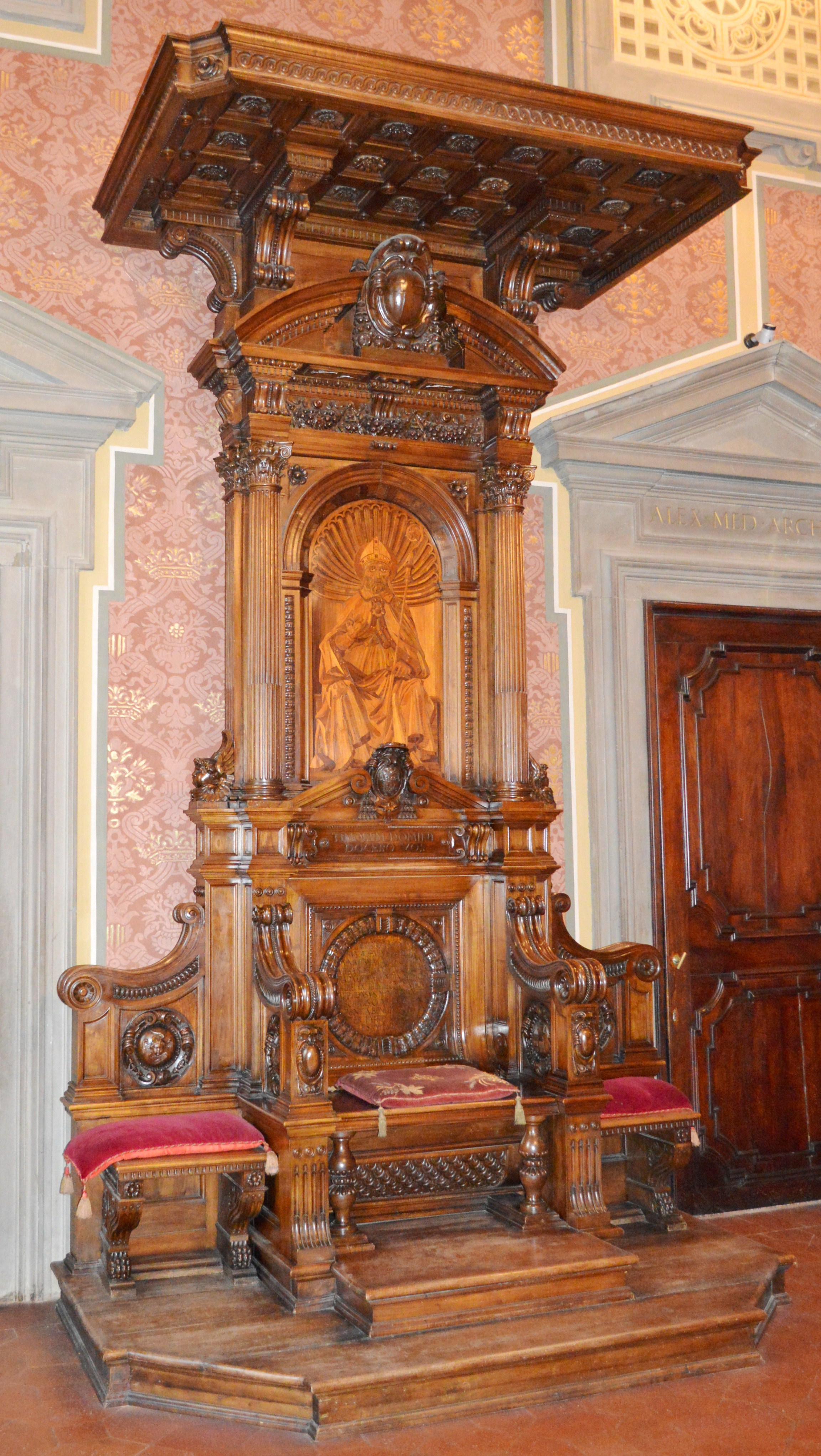 La cattedra (1917).